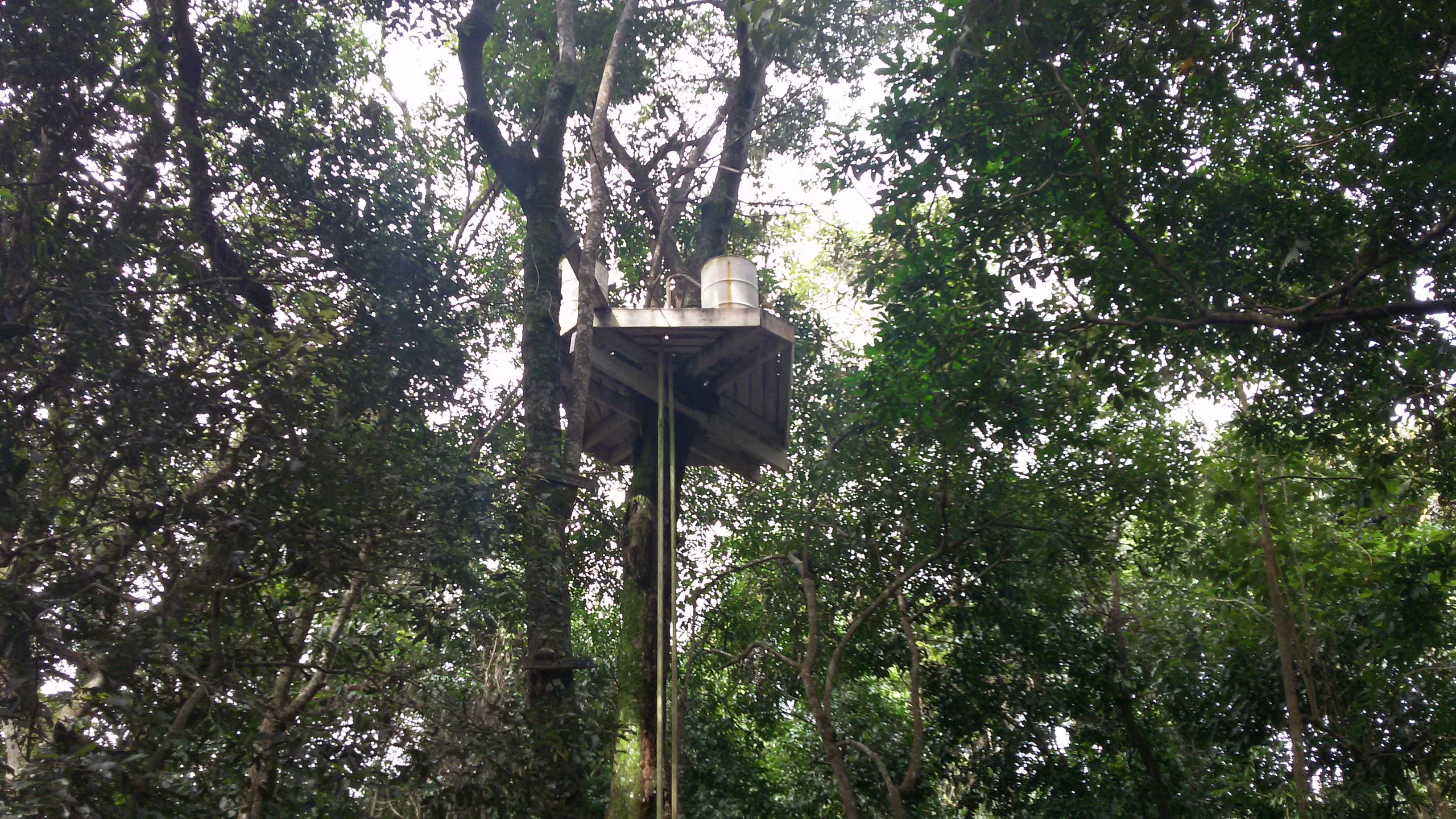 la estrutura de la caja es bien firme